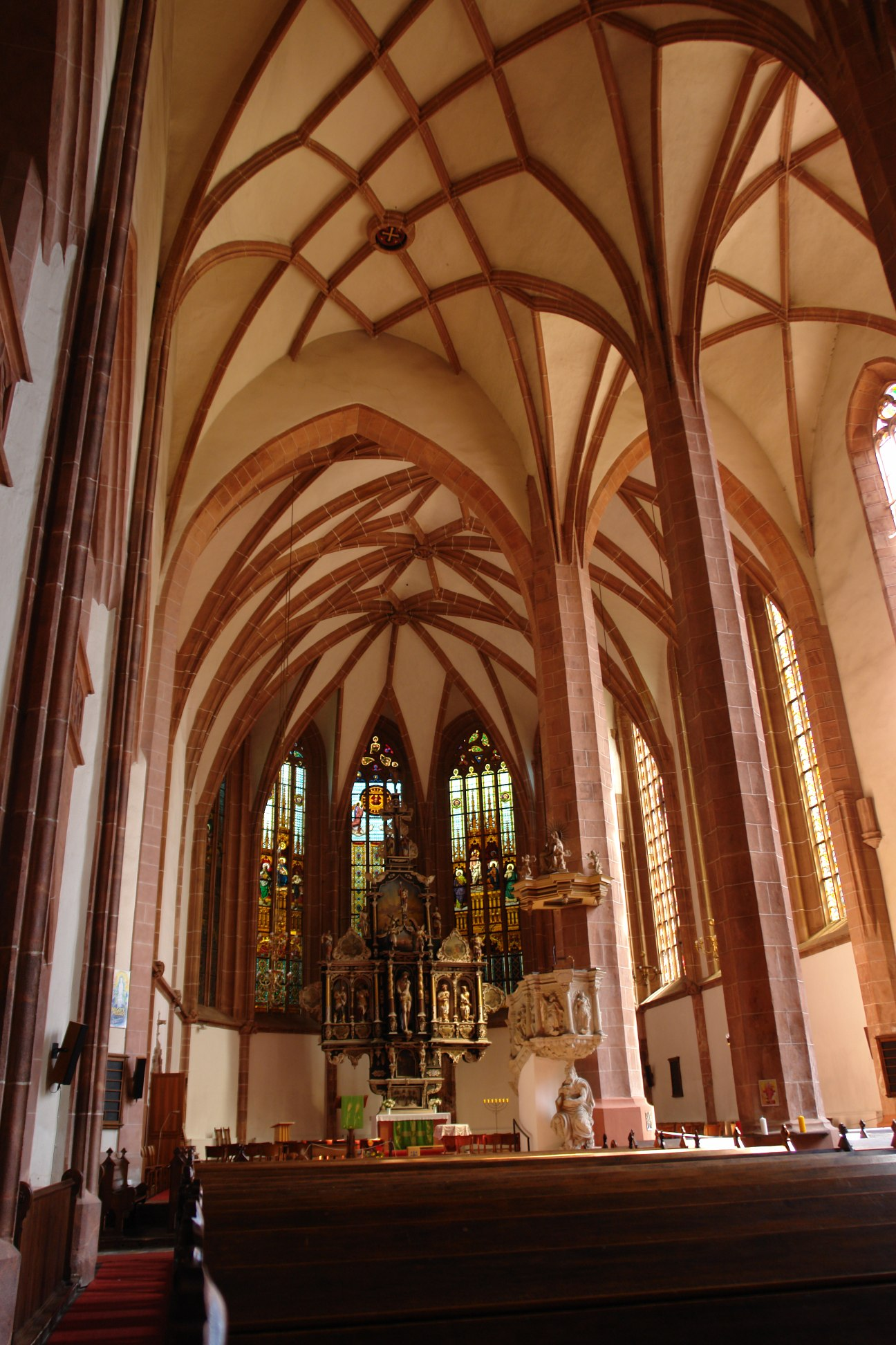 Mittweida Pfarrkirche2-innen